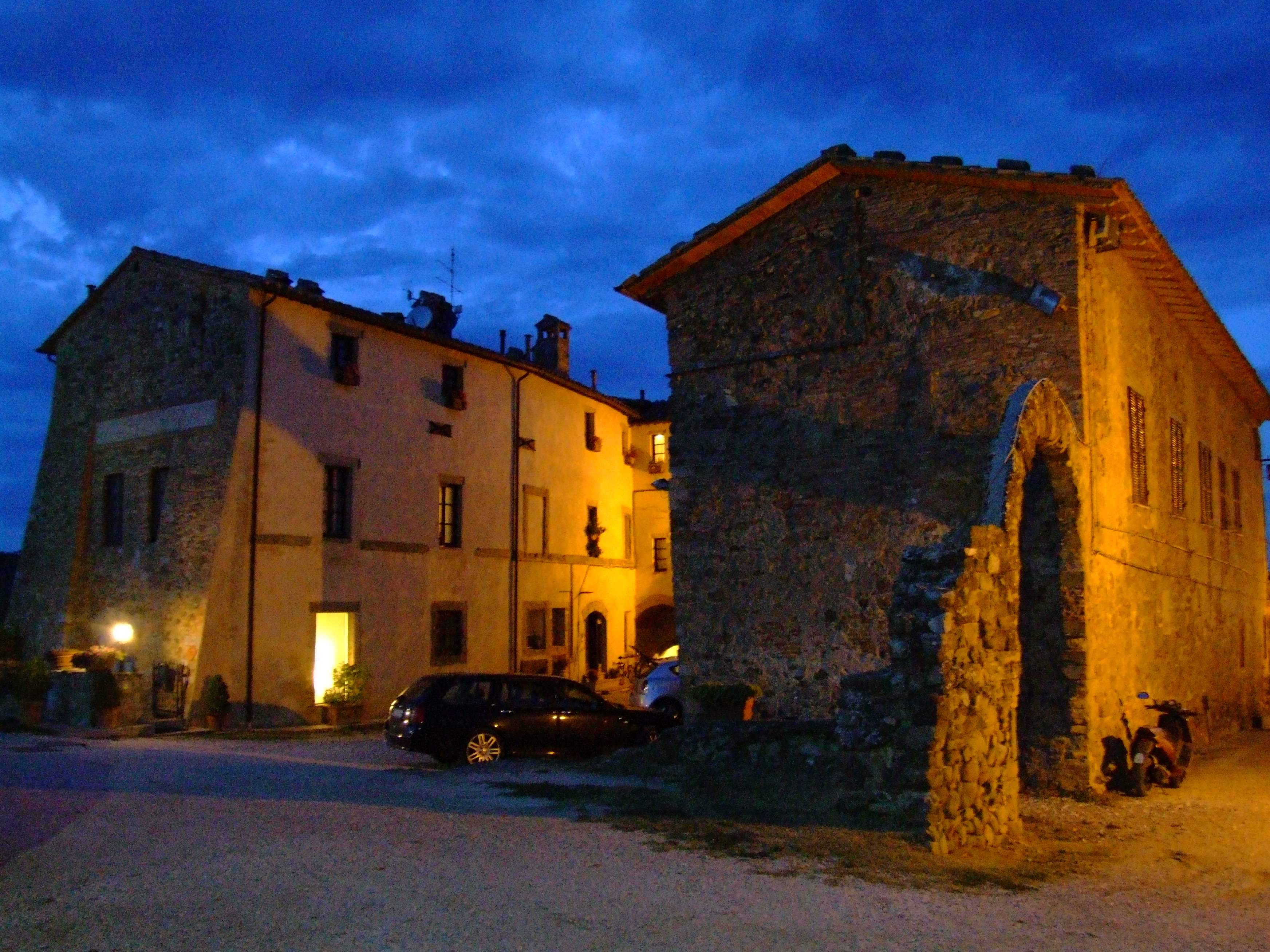 Castello di Migliano - Marsciano (PG) Antico feudo dei Conti di Marsciano